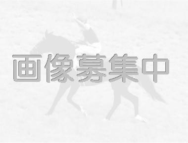 Image:Deep Impact JD WR.jpgを使用